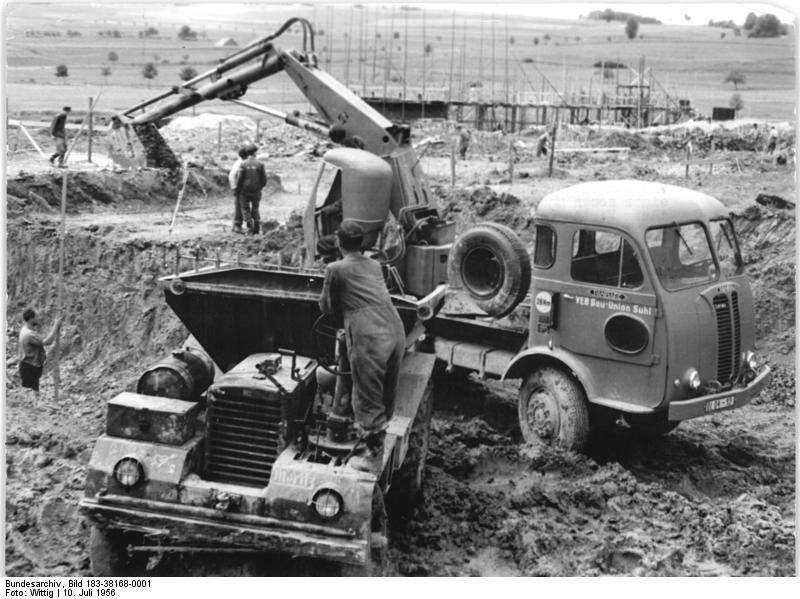 Marisfeld, Bau der MTS Zentralbild Bez.Red.Erfurt (Wittig-Wehse) 10.7.1956 Neue Maschinen- und Traktorenstation entsteht im Kreis Suhl. Seit Beginn dieses Jahres arbeiten die Kollegen des VEB Bau-Union in Marisfeld, Kreis Suhl, am Bau einer neuen Maschinen- und Traktorenstation, die nach ihrer Fertigstellung im Jahre 1957 die Genossenschaftsbauern und werktätigen Einzelbauern der umliegenden Bergdörfer betreuen wird. Bis Ende 1956 wird der erste Maschinenschuppen, das Heizhaus und die Werkstatt, in die eine Kranbahn vom VEB ABUS Leipzig eingebaut wird, fertiggestellt sein. Das kommende Jahr sieht dann den Bau von zwei weiteren Maschinenschuppen, den Bau des Verwaltungsgebäudes und der Garage vor. UBz: Der kleine Bagger Jumbo von der Firma Panhard (Paris) bewegt pro Schicht 120 cbm Erde. Er ist ein kleiner Hoch- und Tieflöffelbagger, der mit Öldruck äusserst schnell und beweglich arbeitet. Im Vordergrund ein Dumper aus der Volksrepublik Ungarn, der die ausgebaggerte Erde befördert. Auf dem Bauplatz der neuen MTS.